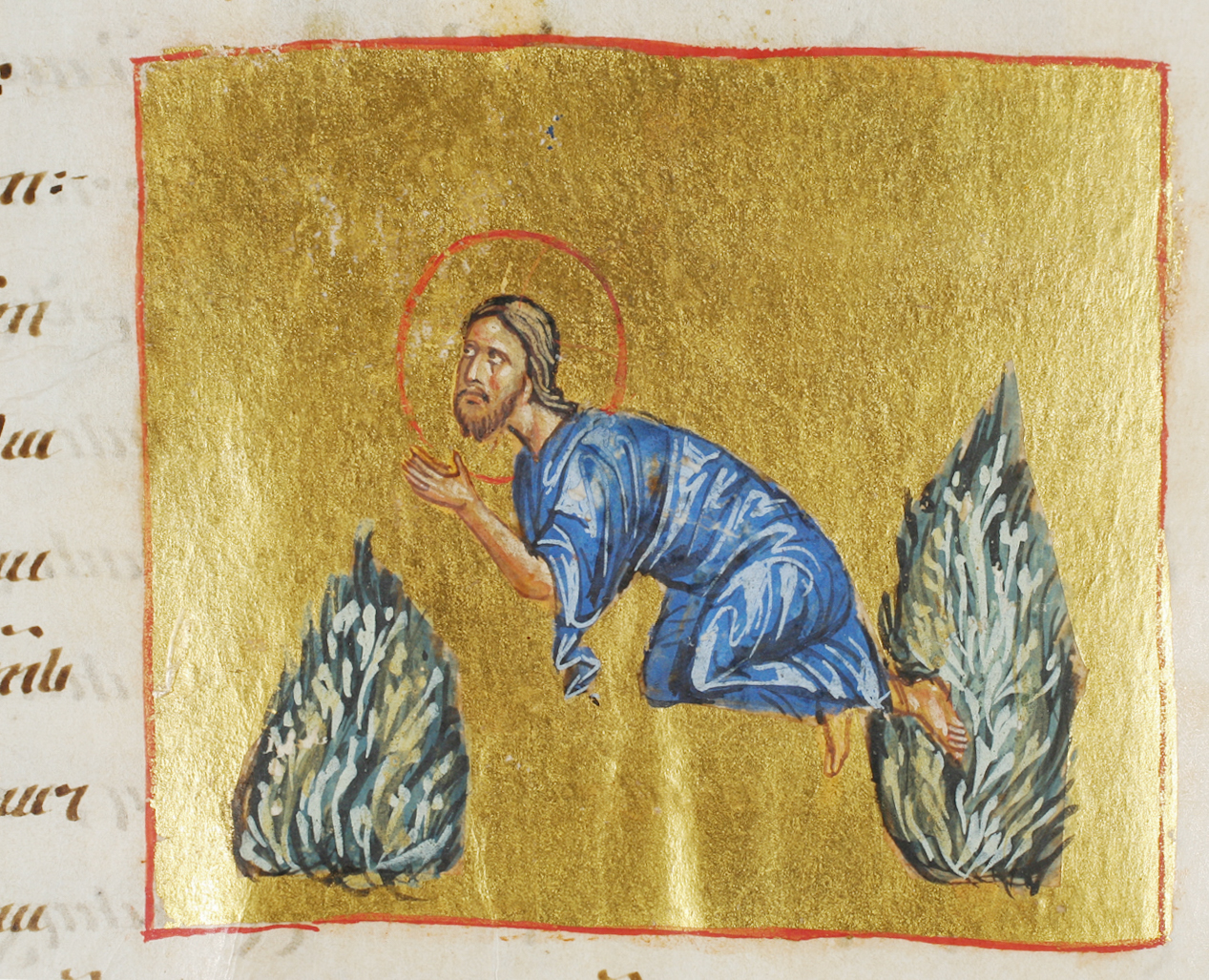 გელათის ოთხთავი, მაცხოვრის ლოცვა